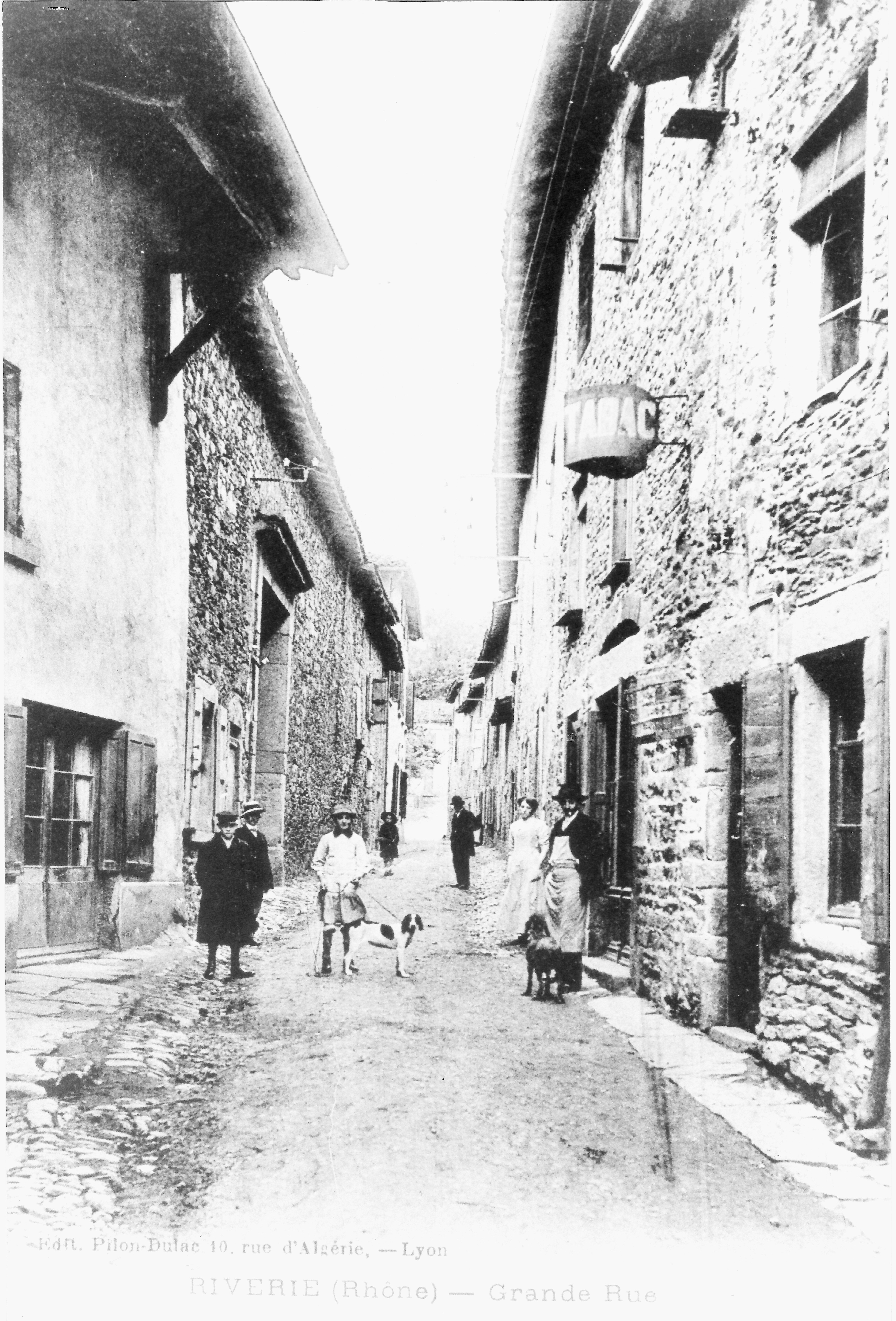 Grande Rue - RIVERIE (Rhône)